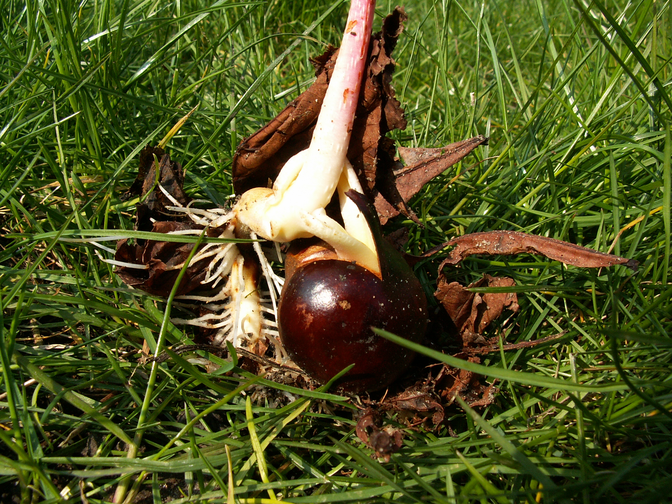 Aesculus hippocastanum seedling